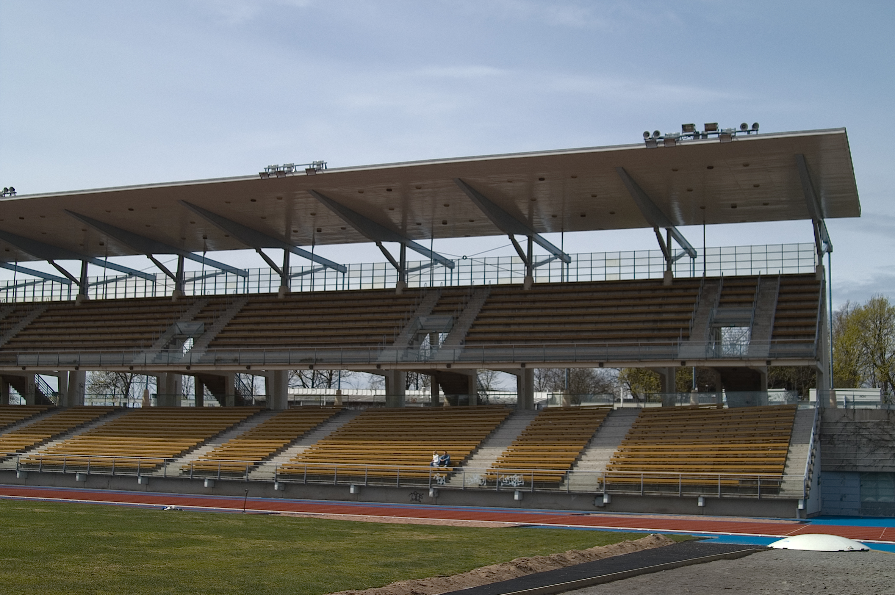 Paavo Nurmi Stadiumin pääkatsomo